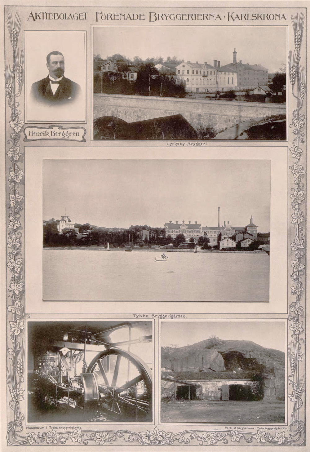 Aktiebolaget Förenade Bryggerierna i Karlskrona och Lyckeby